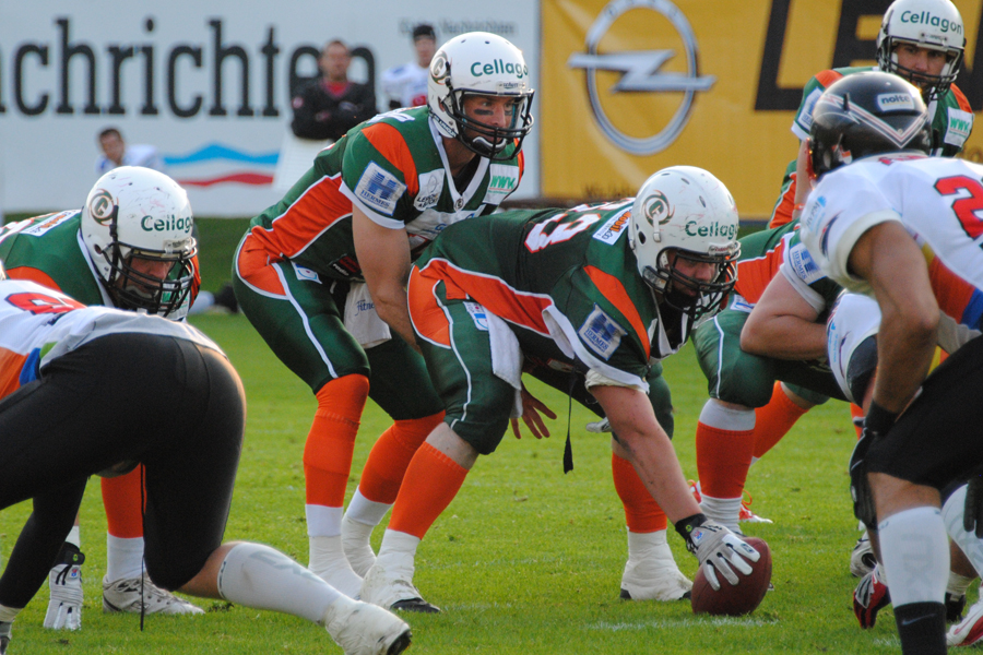 Quarterback Jeff Welsh kurz vor dem nächsten Spielzug; davor Center Oliver Beeck bereit zum Snap (Ballübergabe an Quarterback).